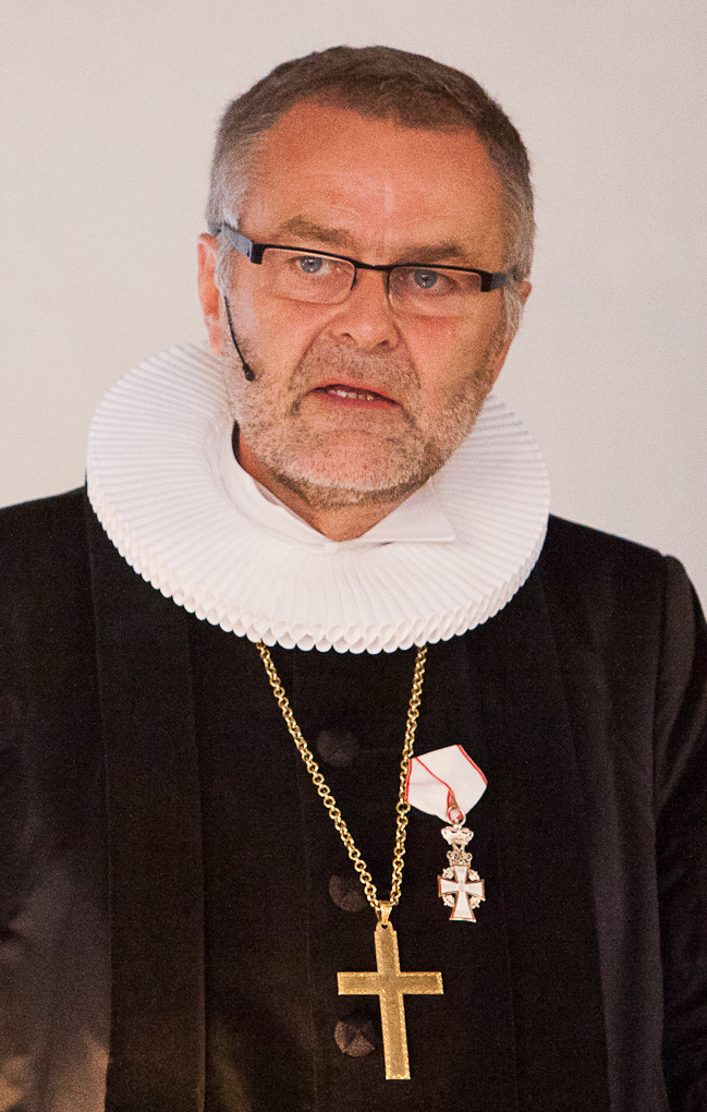 Henning Toft Bro, Biskop over Aalborg Stift siden 2010. Tidligere medlem af musikgruppen Tørfisk. Her ved gudstjeneste i anledning af Flagdag for Danmarks udsendte den 5. september 2011.